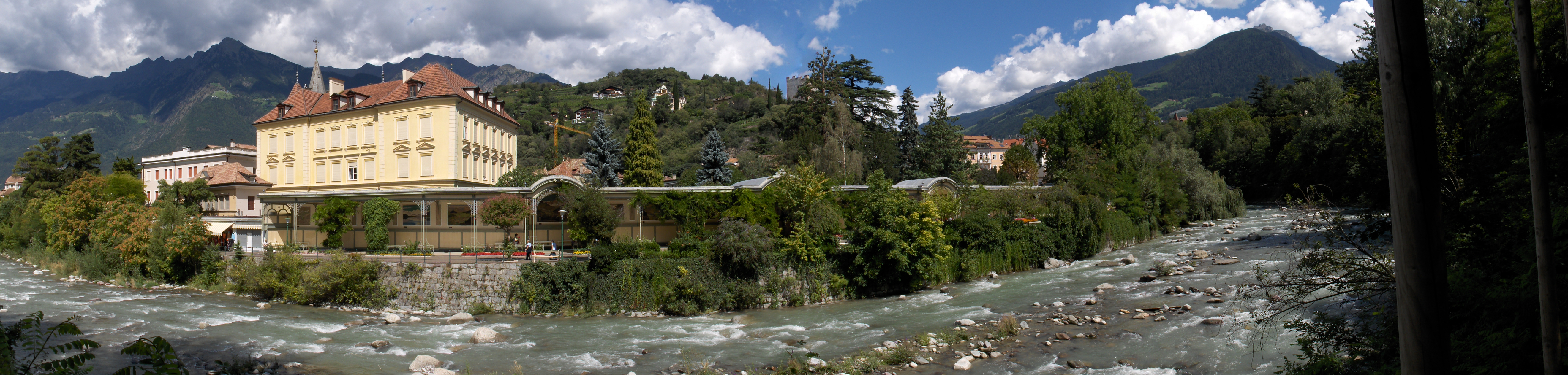 Meran Passer River, Panoramaaufnahme von 2006. Bitte beachten, dass der Fluss in Wirklichkeit keinen Knick macht.